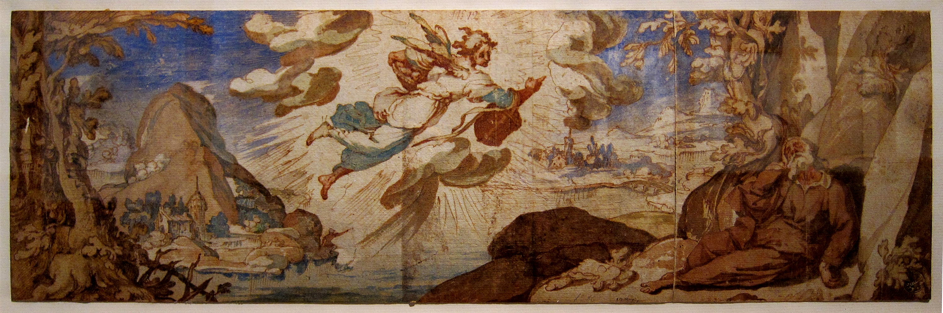 Le prophète Élie visité par un ange au Palais des beaux-arts de Lille.